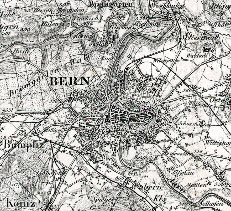 Bern auf der Dufourkarte (Ausgabe von 1907)